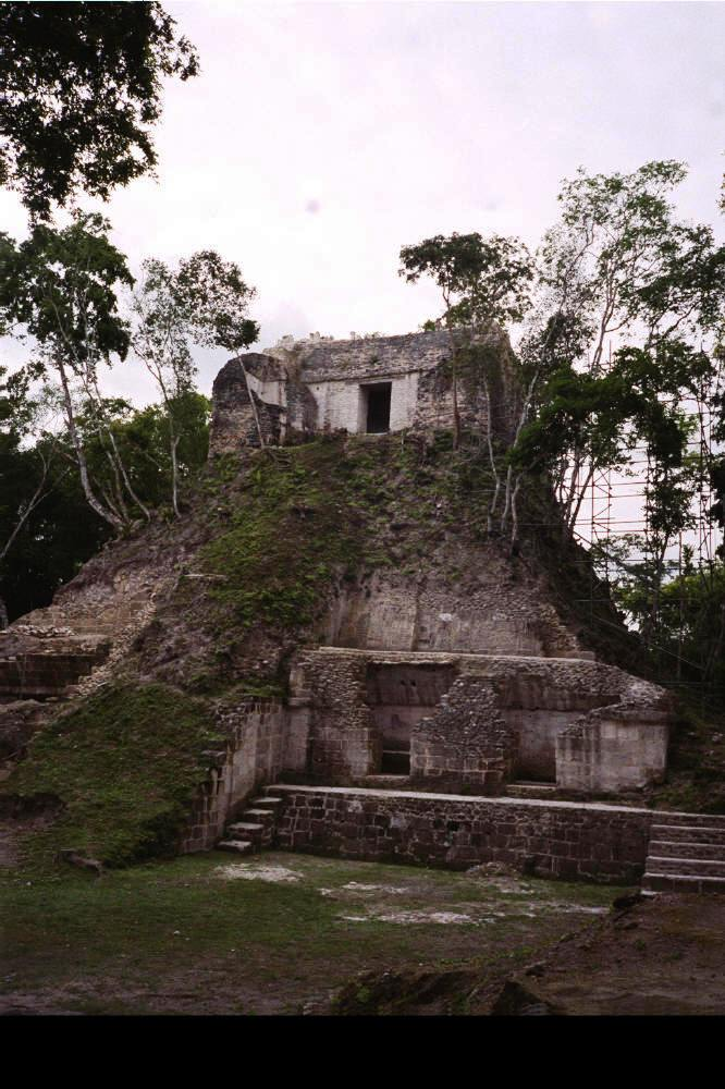 R. Villalobos, Feb 2003, Fair Use